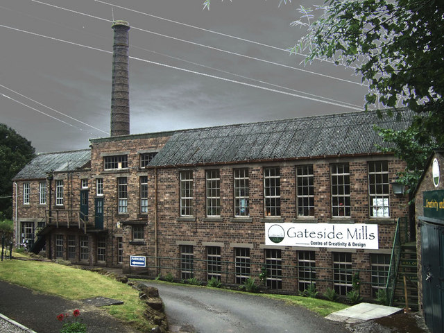 Gateside Mills, Gateside